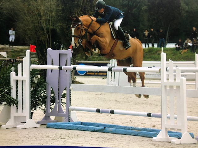 Pascal Lévy et Alegro LS dans le Grand prix